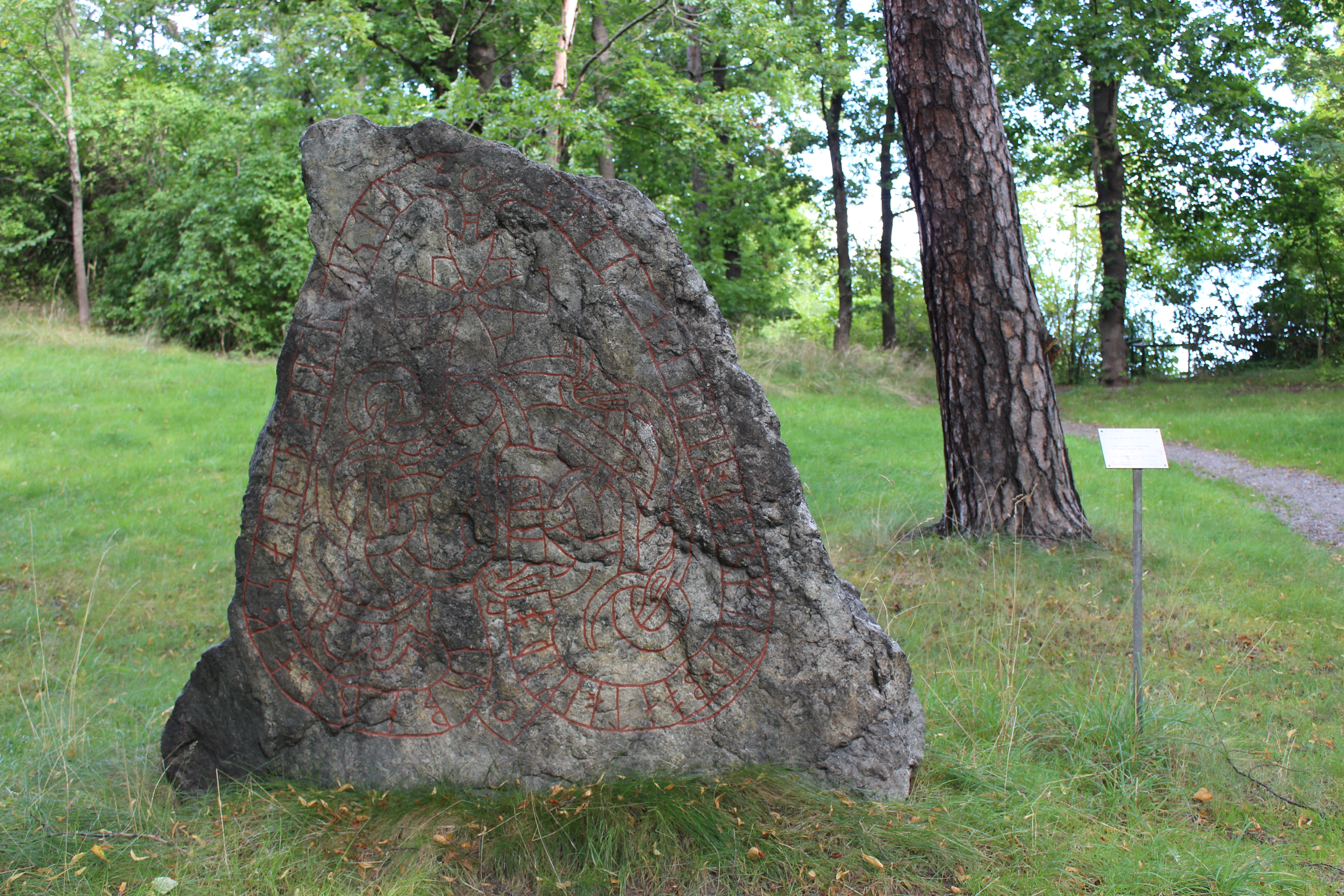 Solna 23:1 Runristning. Runstenen, U121, av granit 1,85 meter hög 2 meter bred nedtill, avsmalnande upptill. Runstenen flyttades till platsen från ett nu bortodlat gravfält söder om Stora Frösunda